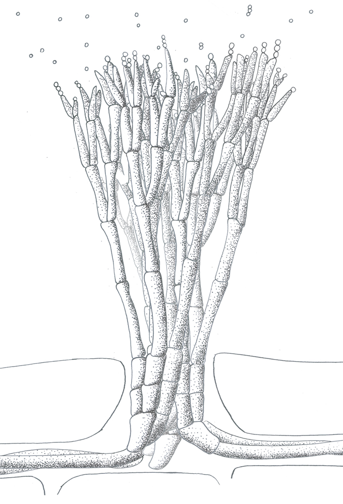 Morfología de un esporodoquio. Se muestra una conjunto apretado de conidióroros atravesando la superficie de un tejido vegetal.